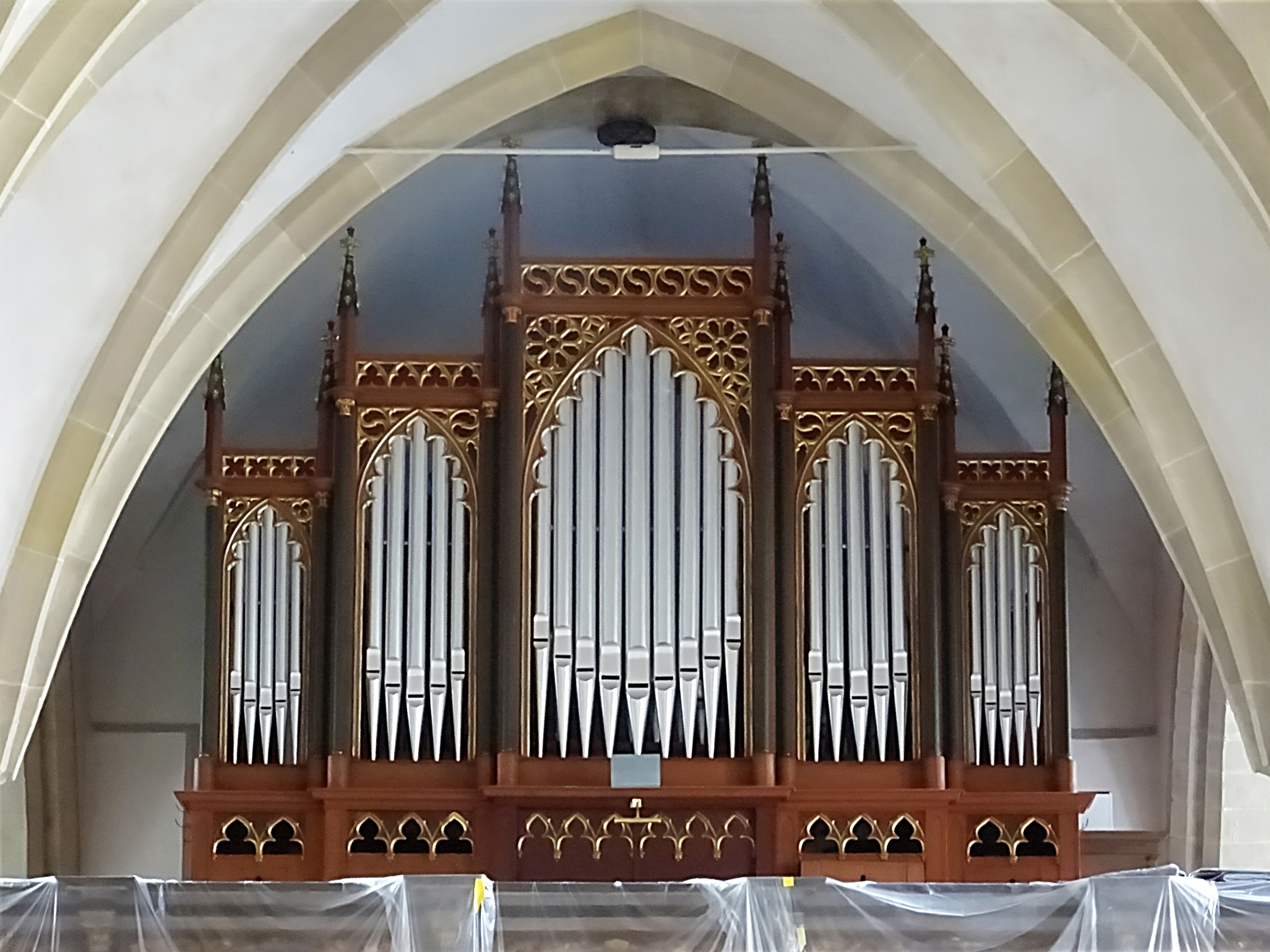 Orgel von Ernst Röver (1920 aufgestellt) im Prospekt der 1849 gebauten Vorgängerorgel von Johann Friedrich Schulze in der Pfarrkirche St. Nikolai (Quedlinburg)